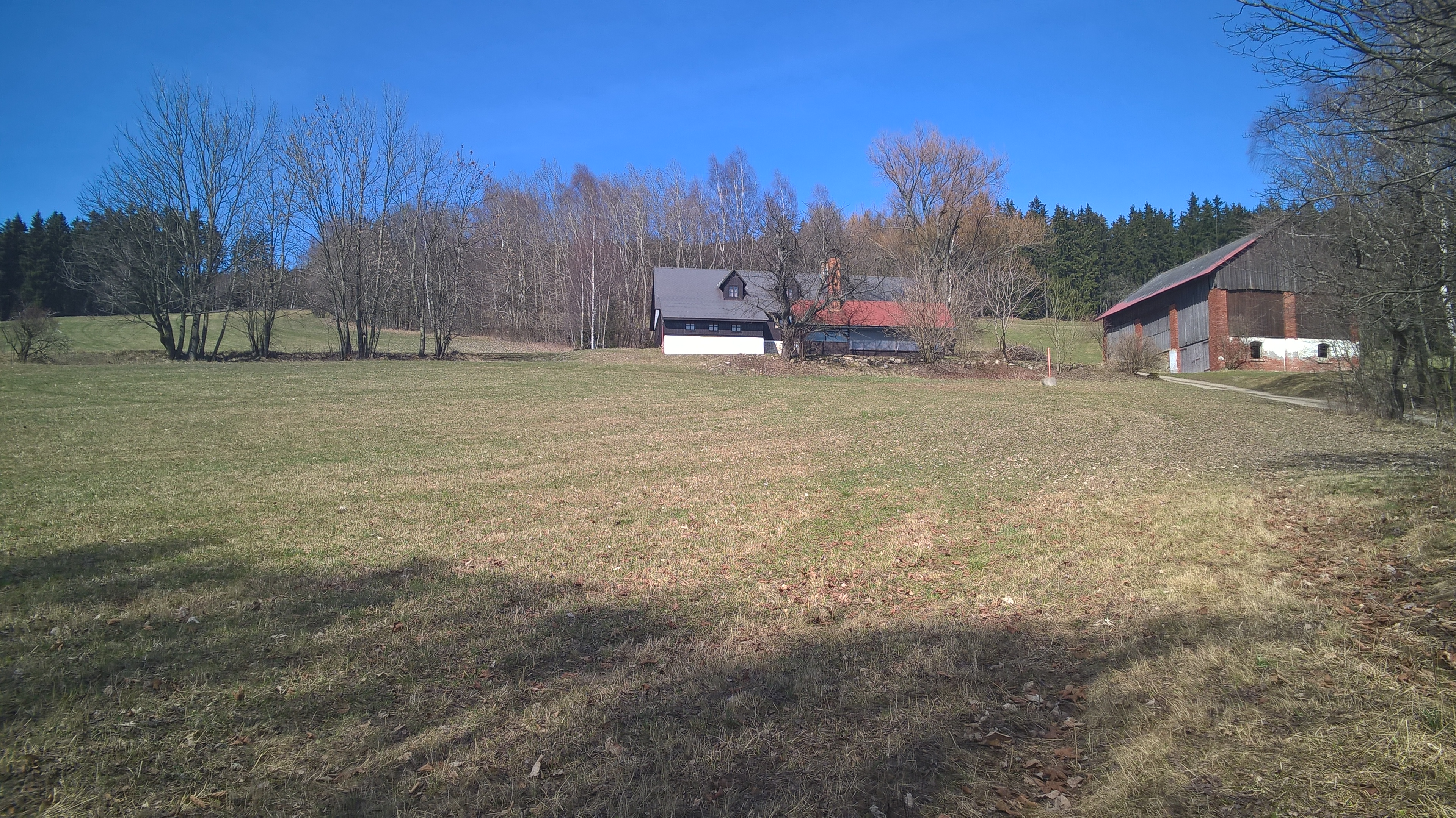 Podžalí (stavení Žalý čp. 1, Benecko)